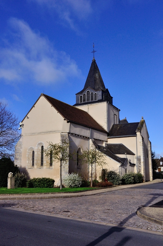 Saint-Maur (Indre) - Eglise Saint-Maur